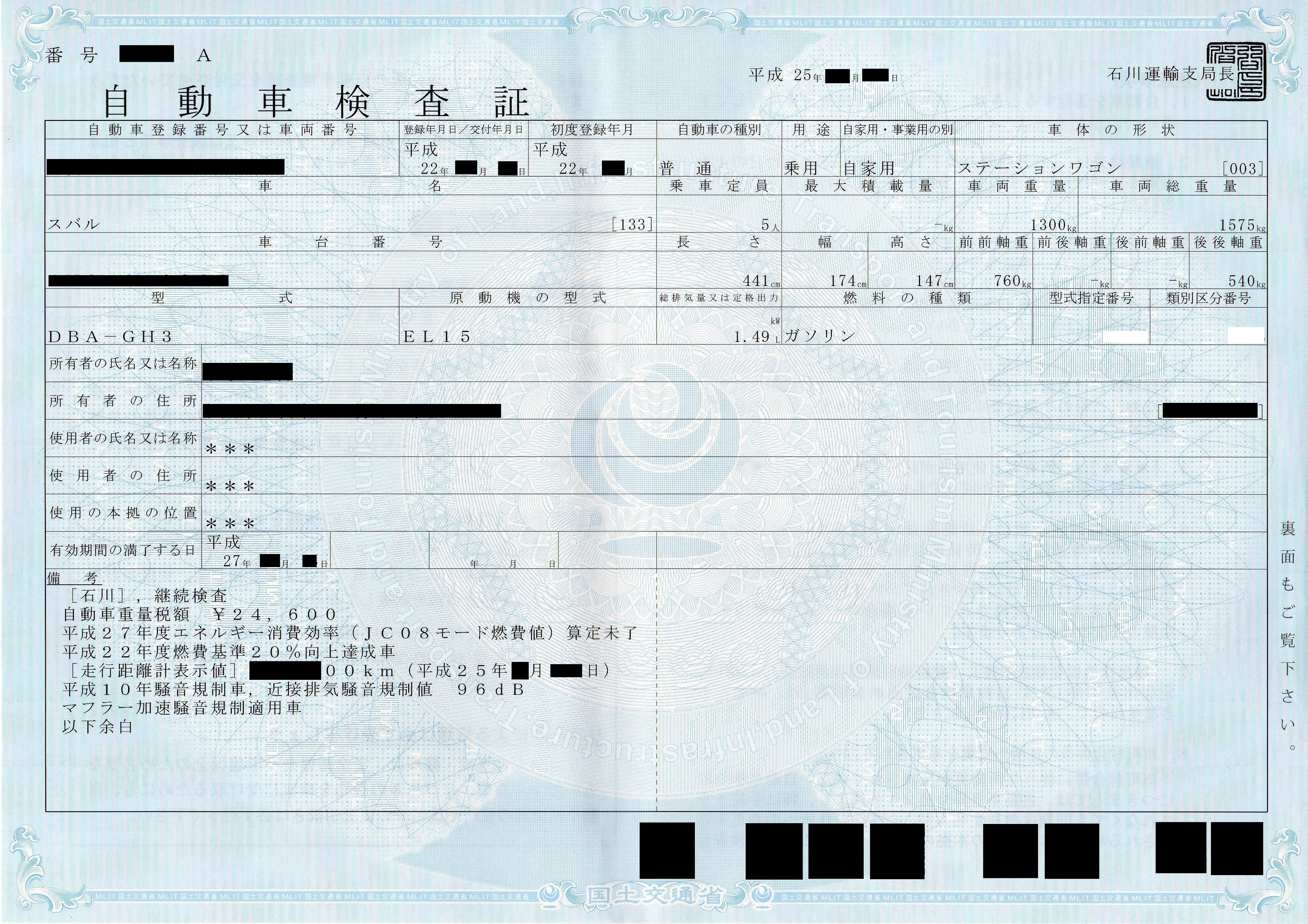 自動車検査証（国土交通省発行）